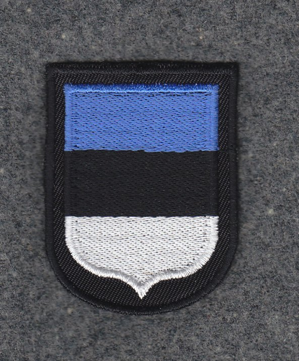 Нарукавная эмблема 20-й дивизии СС